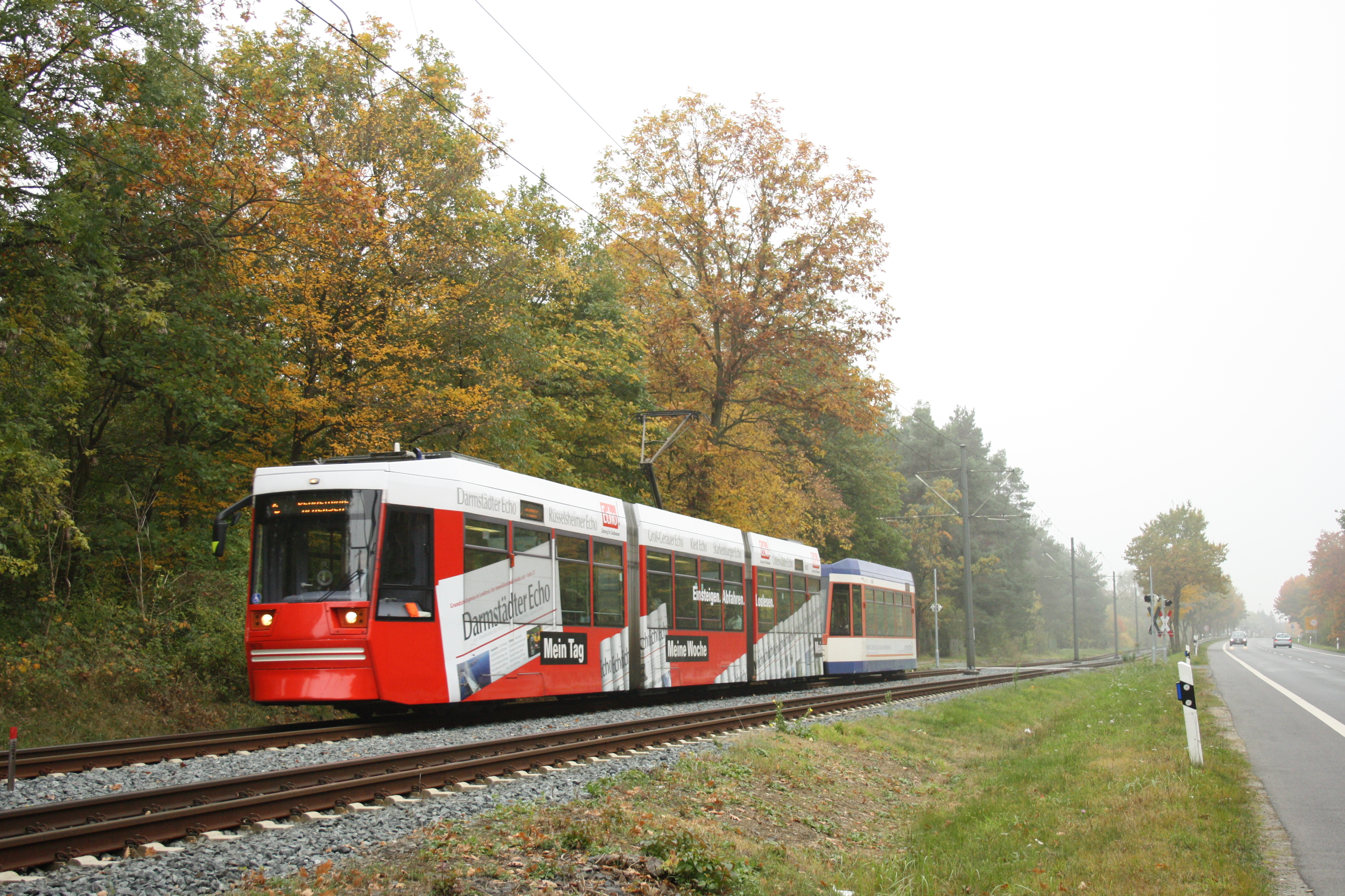 9870 ist der einzige Triebwagen der Serie ST13, der noch seine Vollwerbung besitzt.